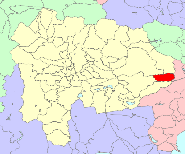 山梨県南都留郡秋山村の位置画像。